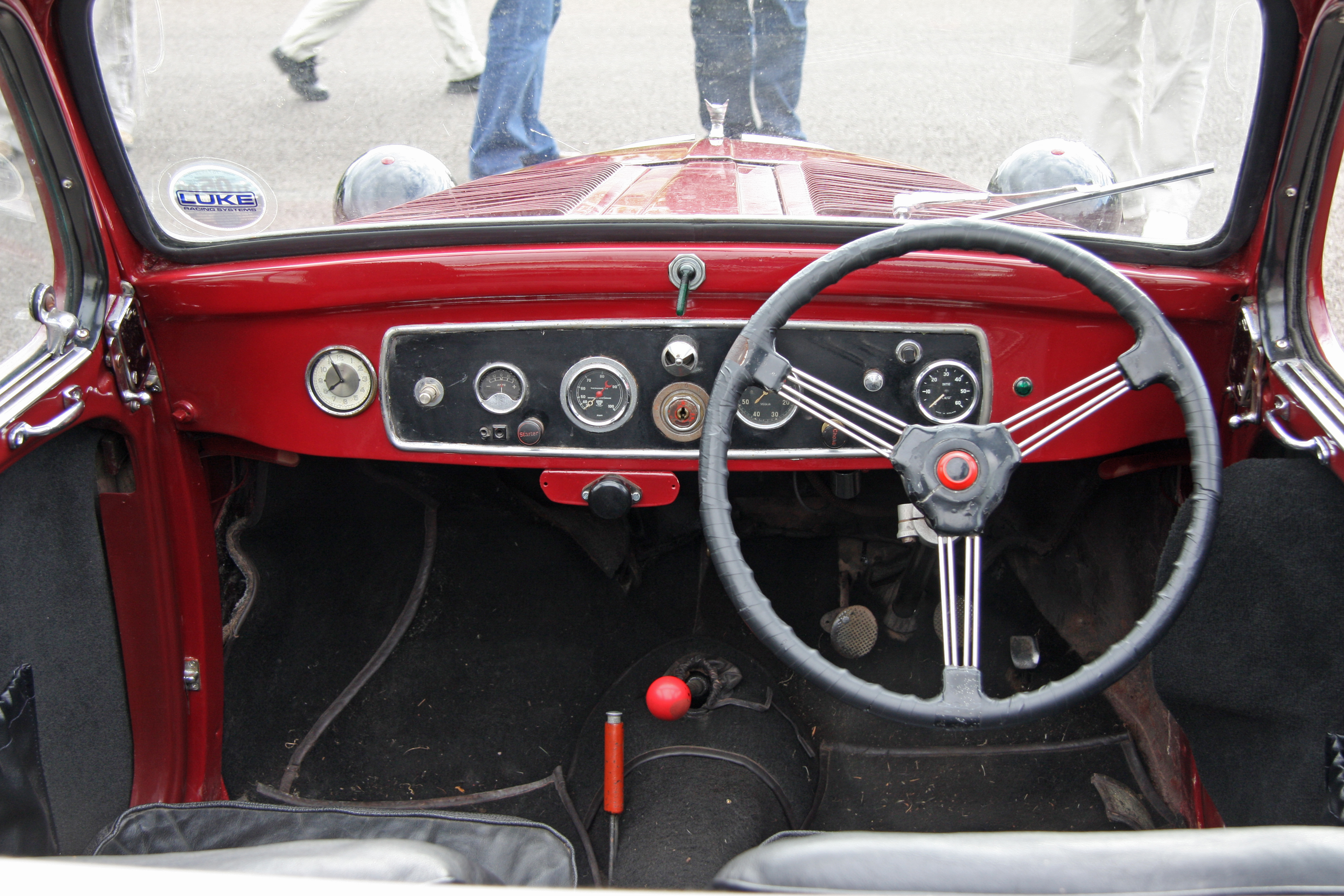 Fiat 500 Topolino